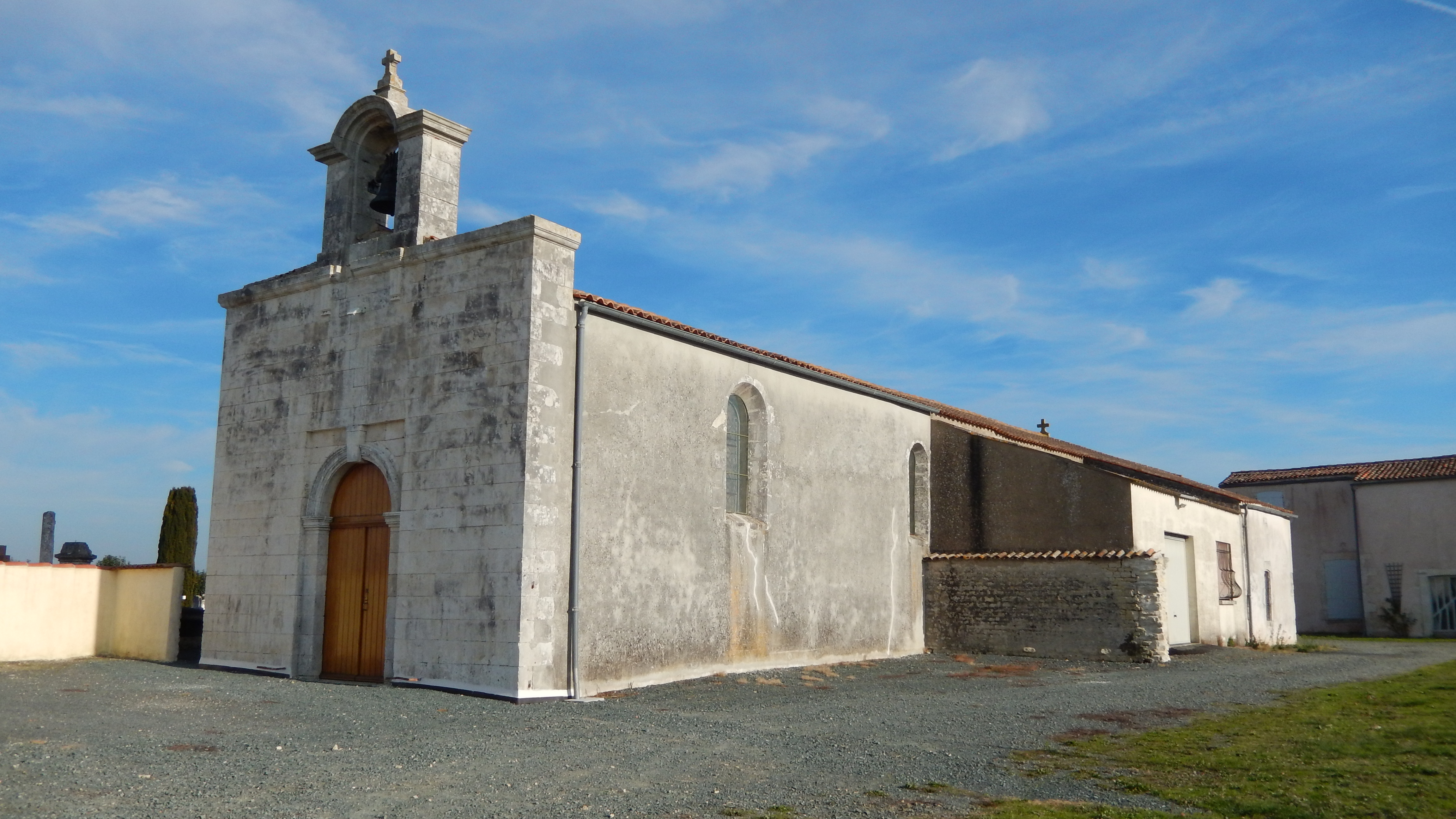 Saint-Ouen-d'Aunis, Charente-Maritime, France. L'église du village, vue par l'ouest.